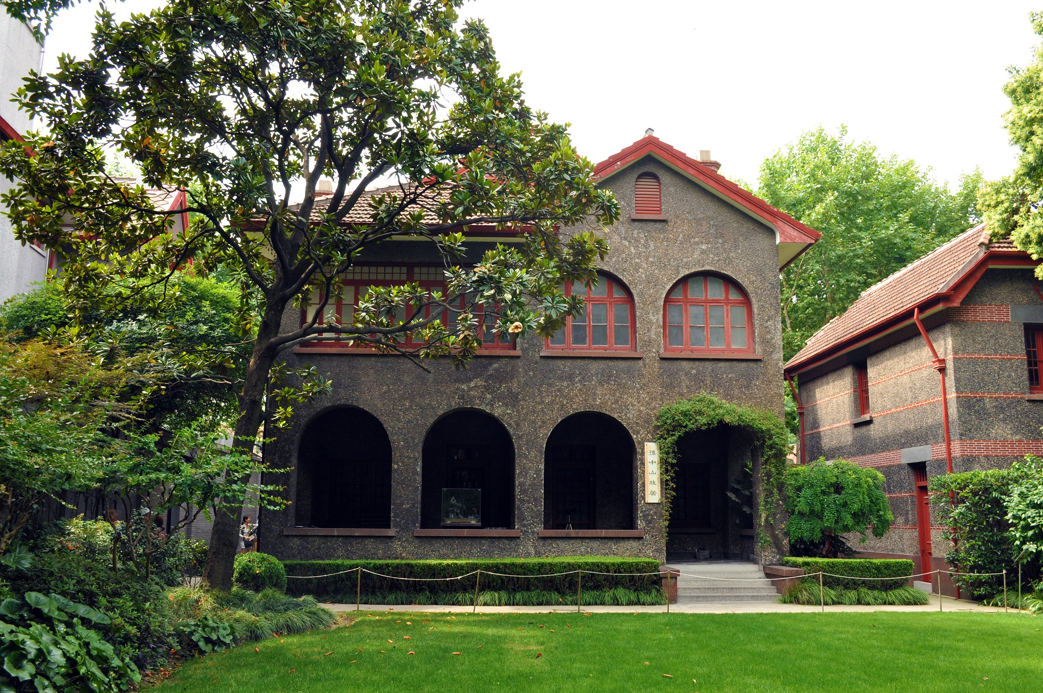 上海中山故居 黄浦区香山路7号 1919年